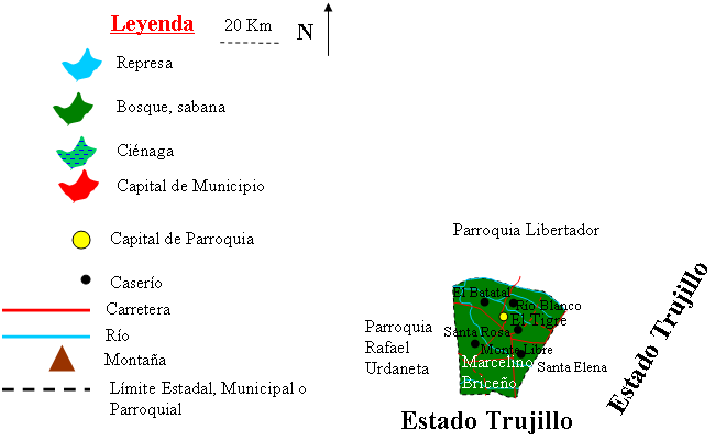 Mapa Parroquia Marcelino Briceño, Municipio Baralt, Estado Zulia, Venezuela